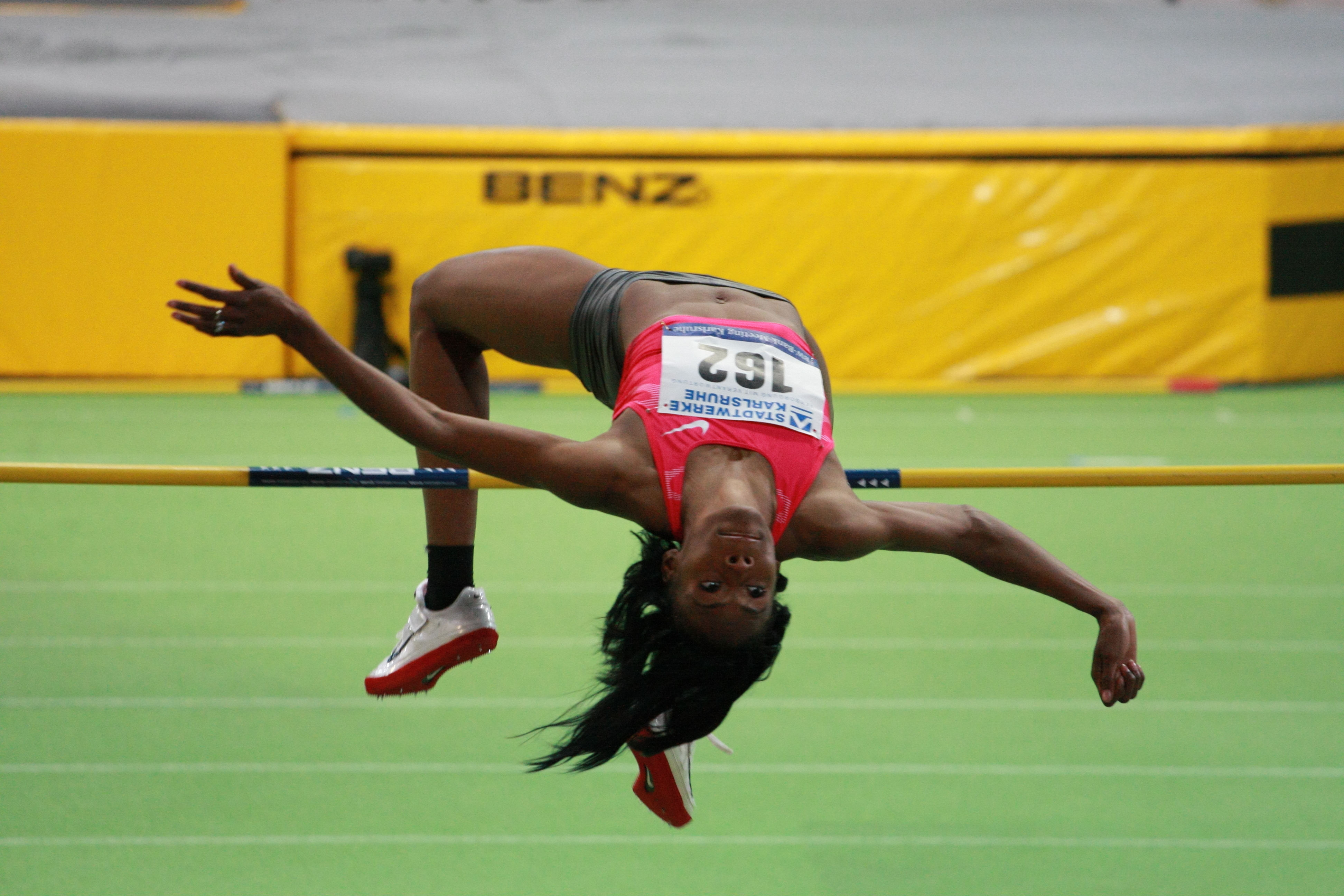 BW Bank Meeting Karlsruhe 2010